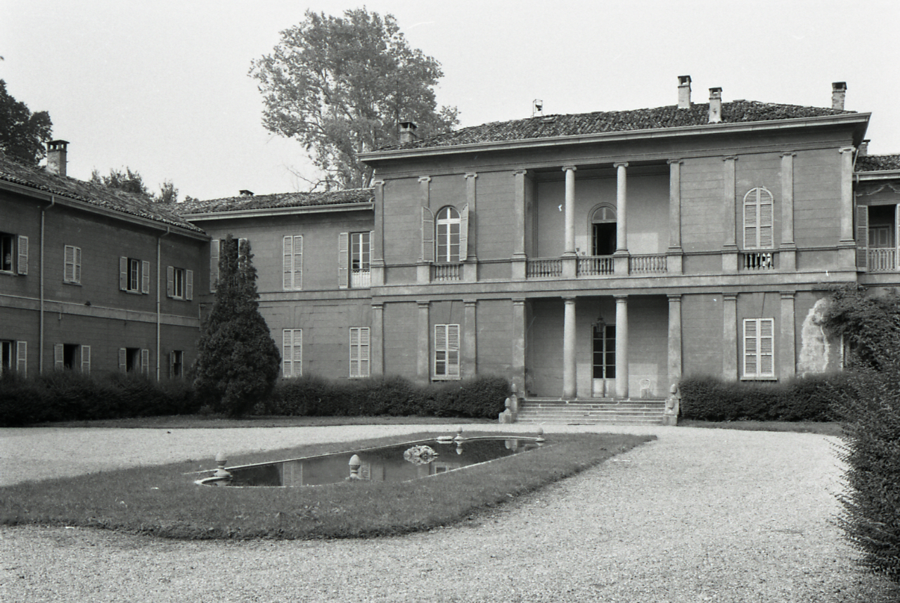 Servizio fotografico : Milano, 1968 / Paolo Monti. - Strisce: 7, Fotogrammi complessivi: 38 : Negativo b/n, gelatina bromuro d'argento/ pellicola ; 35 mm. - ((I fotogrammi hanno una doppia numerazione. . - Sul portanegativi: Nikon Agfa 21. - Occasione: Documentazione per la pubblicazione: "Emilio CECCHI, Natalino SAPEGNO (a cura di), Storia della Letteratura Italiana, 9 voll., Milano, Garzanti, 1966 e segg."